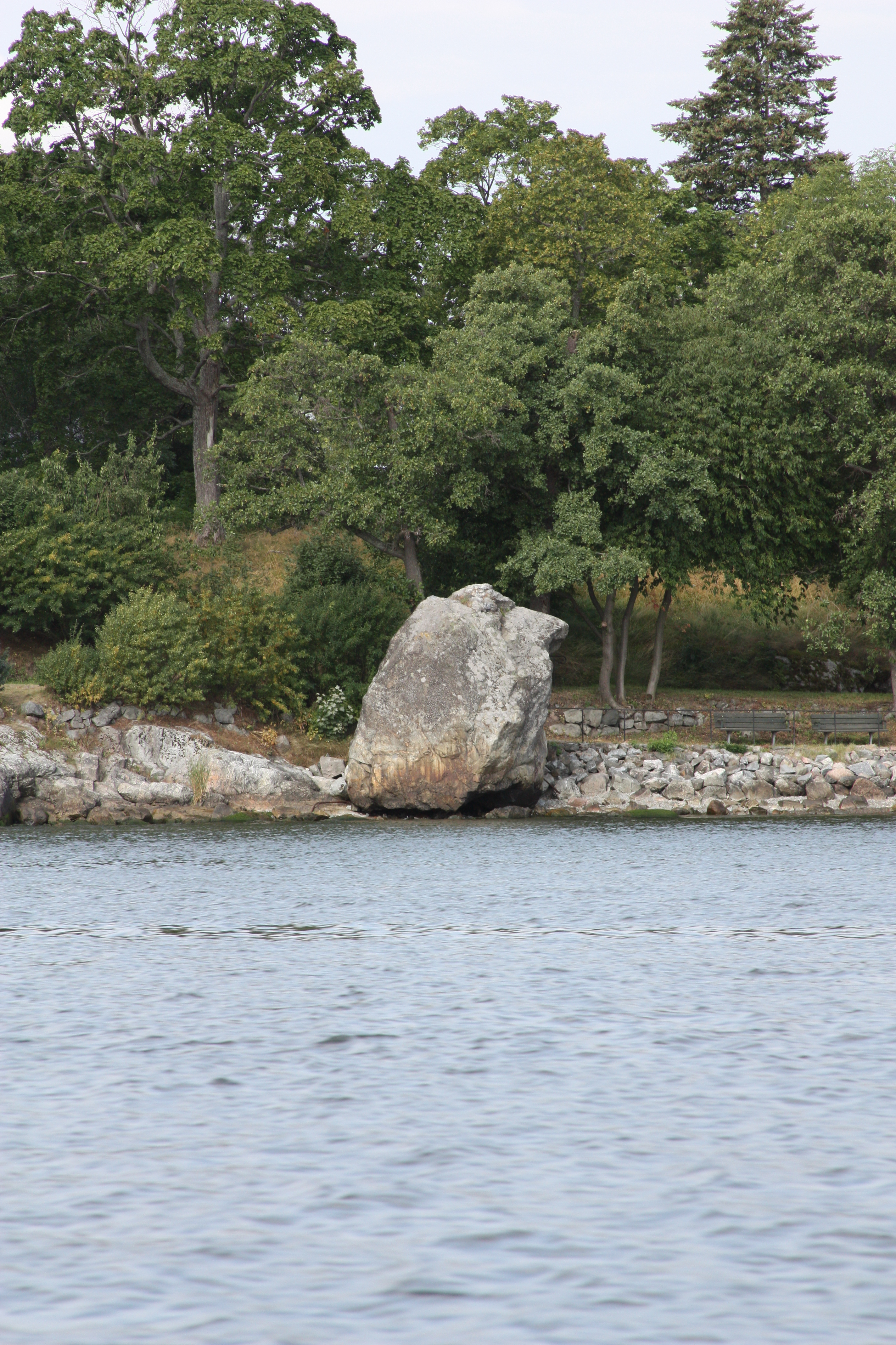 Stockholm